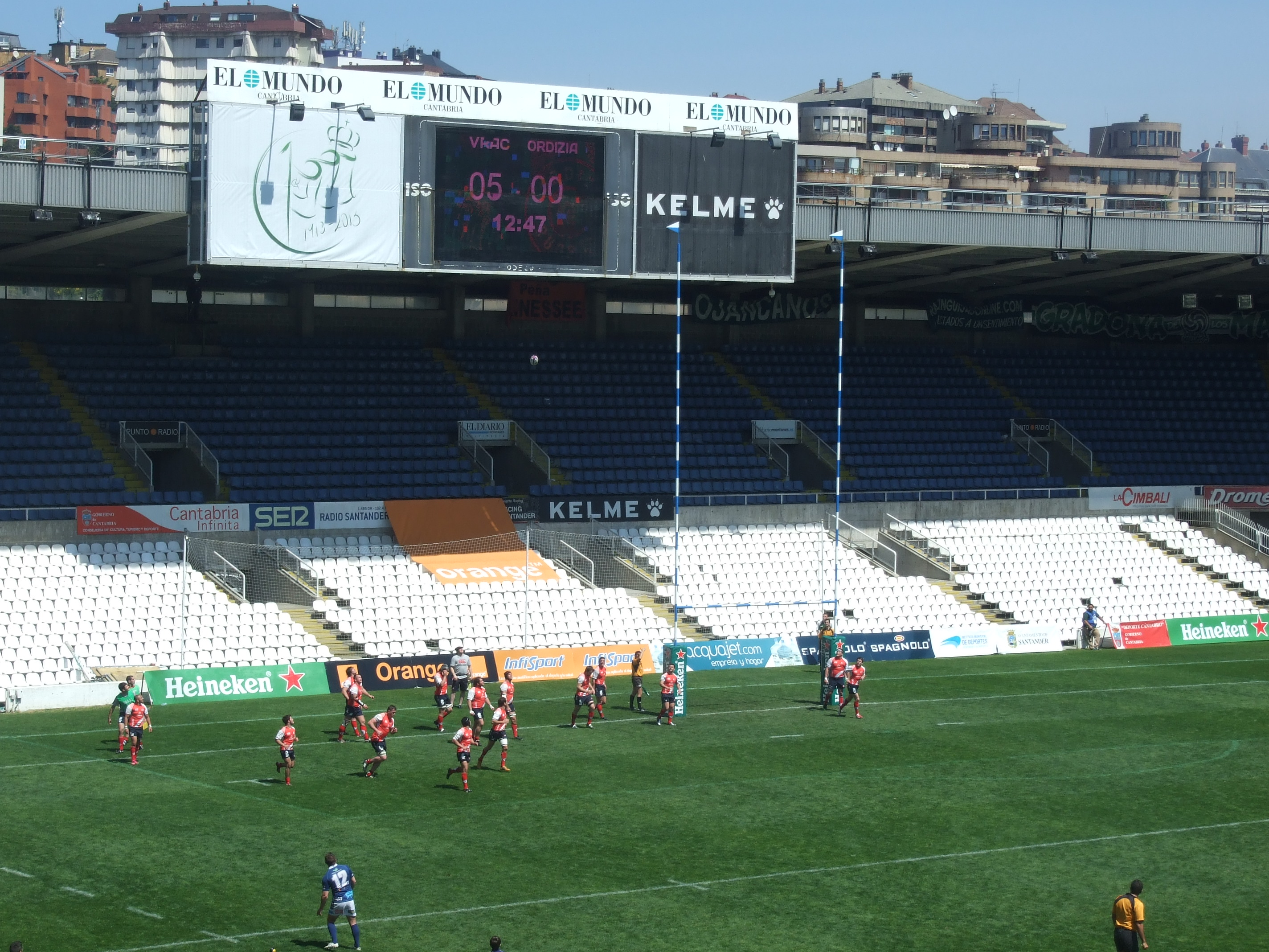 Copa del Rey de rugby 2013. VRAC Quesos Entrepinares ante AMPO Ordizia.